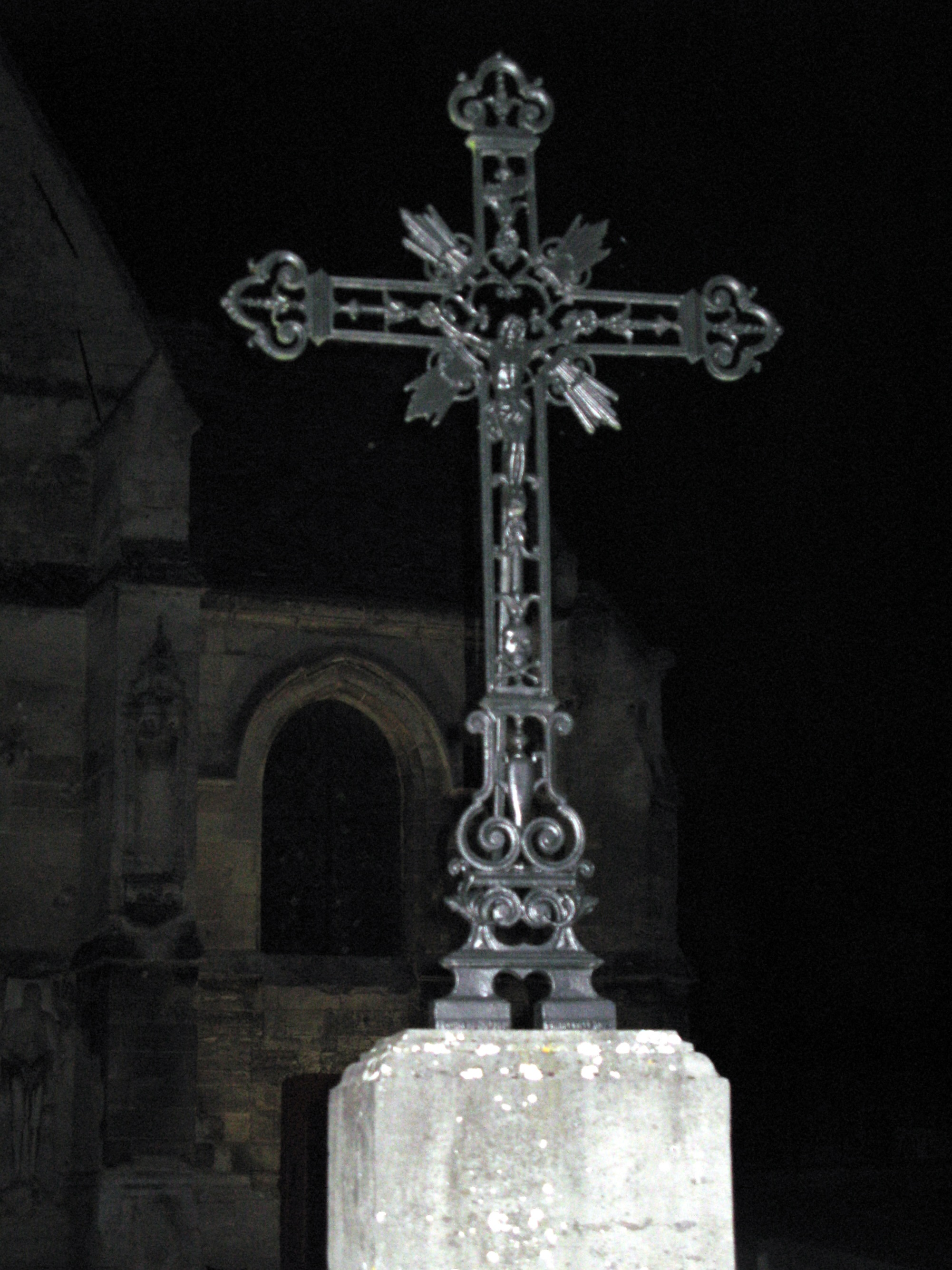 Blérancourt (Aisne, France) - Croix devant l'église (vue nocturne). .